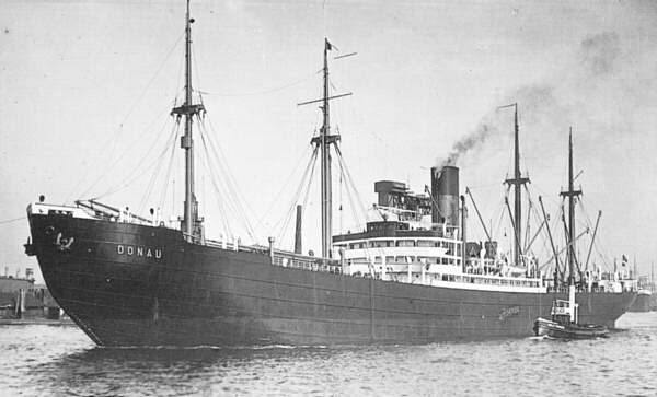 Deer deutsche Frachter DONAU des NDL